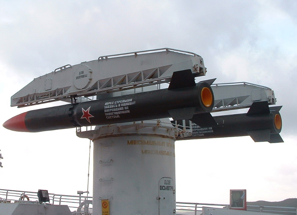 Zwei RPK-1 Wichr (NATO-Code: SUW-N-1; FRAS-1) ballistische U-Boot-Abwehrrakete aus sowjetischer Produktion.